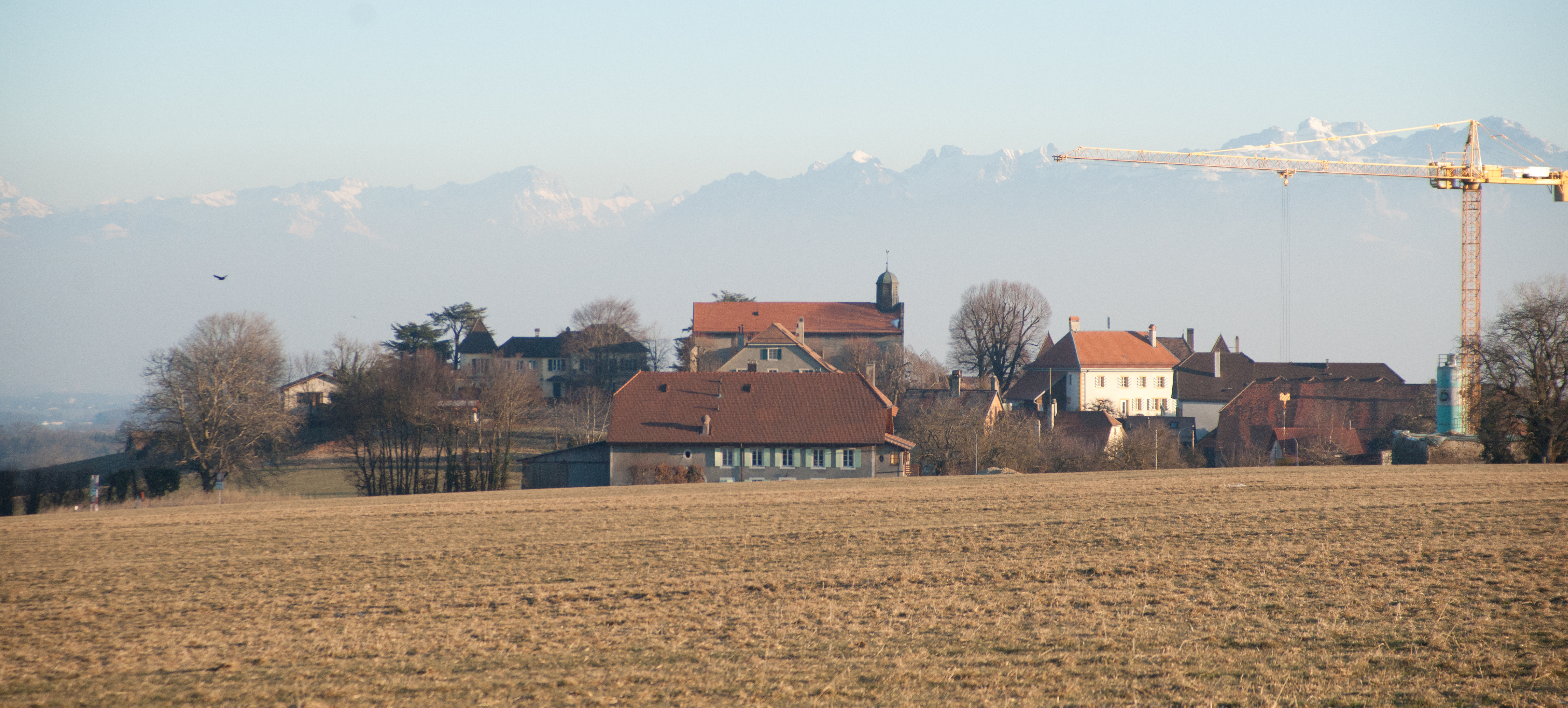 Pampigny, canton de Vaud, Suisse.